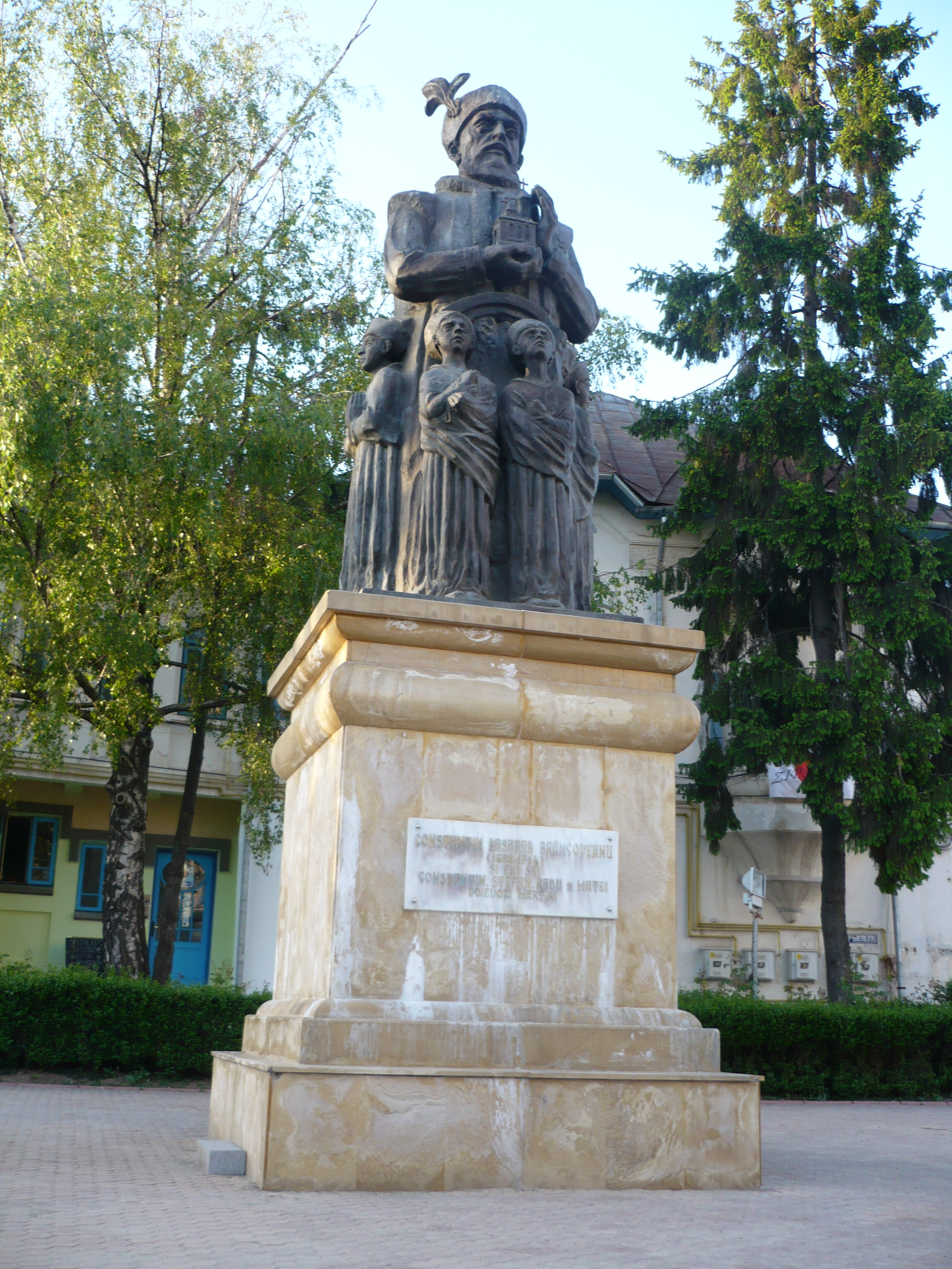 Statuia lui Constantin Brâncoveanu si fii sai Târgoviște